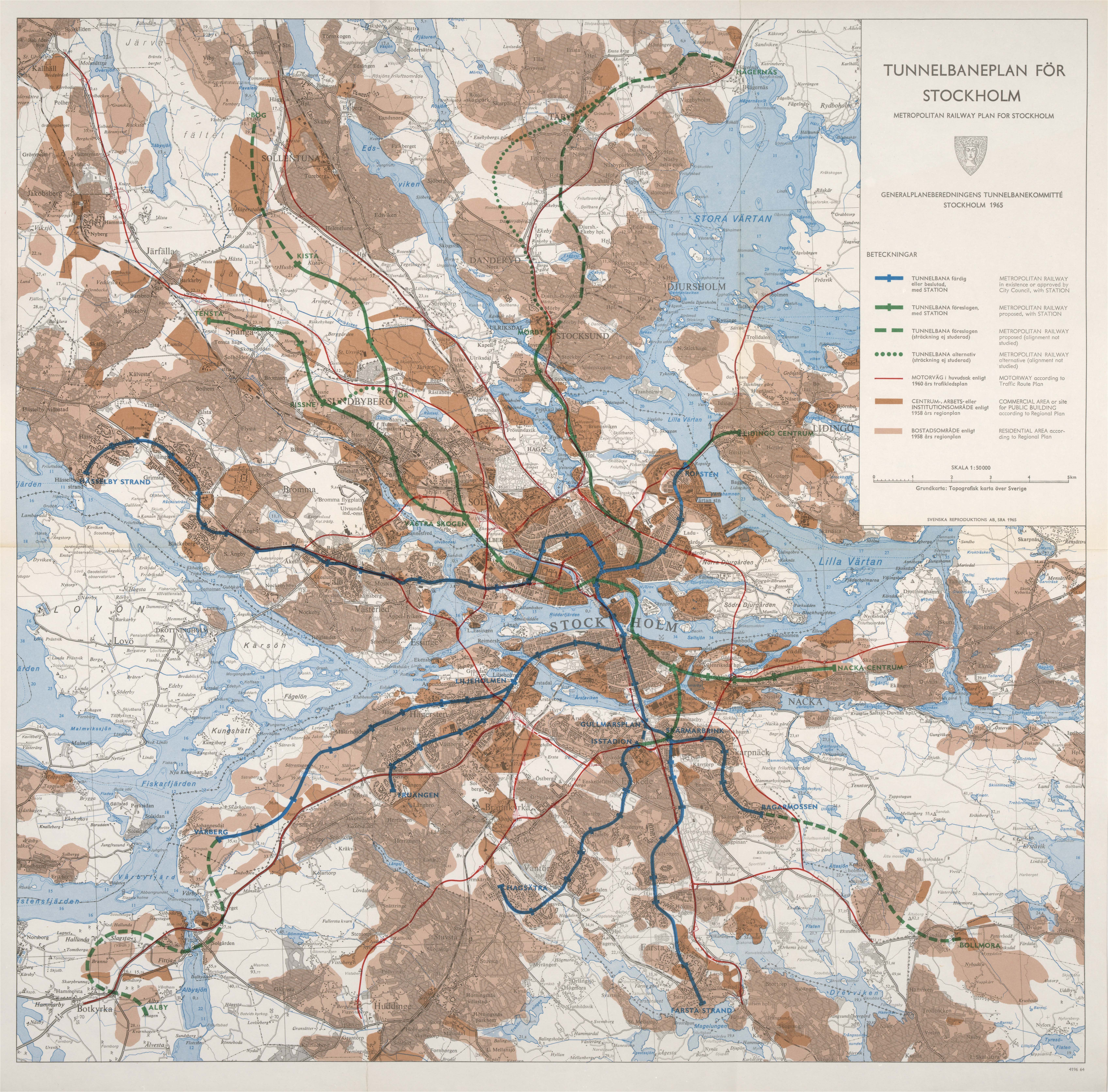 Tunnelbaneplanen för Stockholm 1965